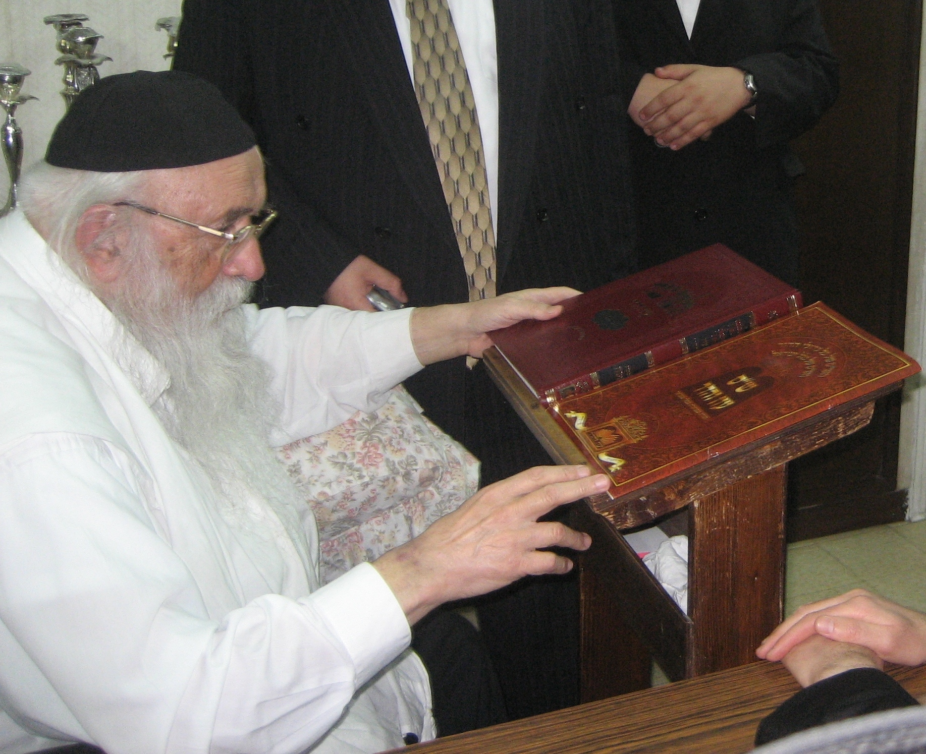 הרב חיים שאול גריינימן